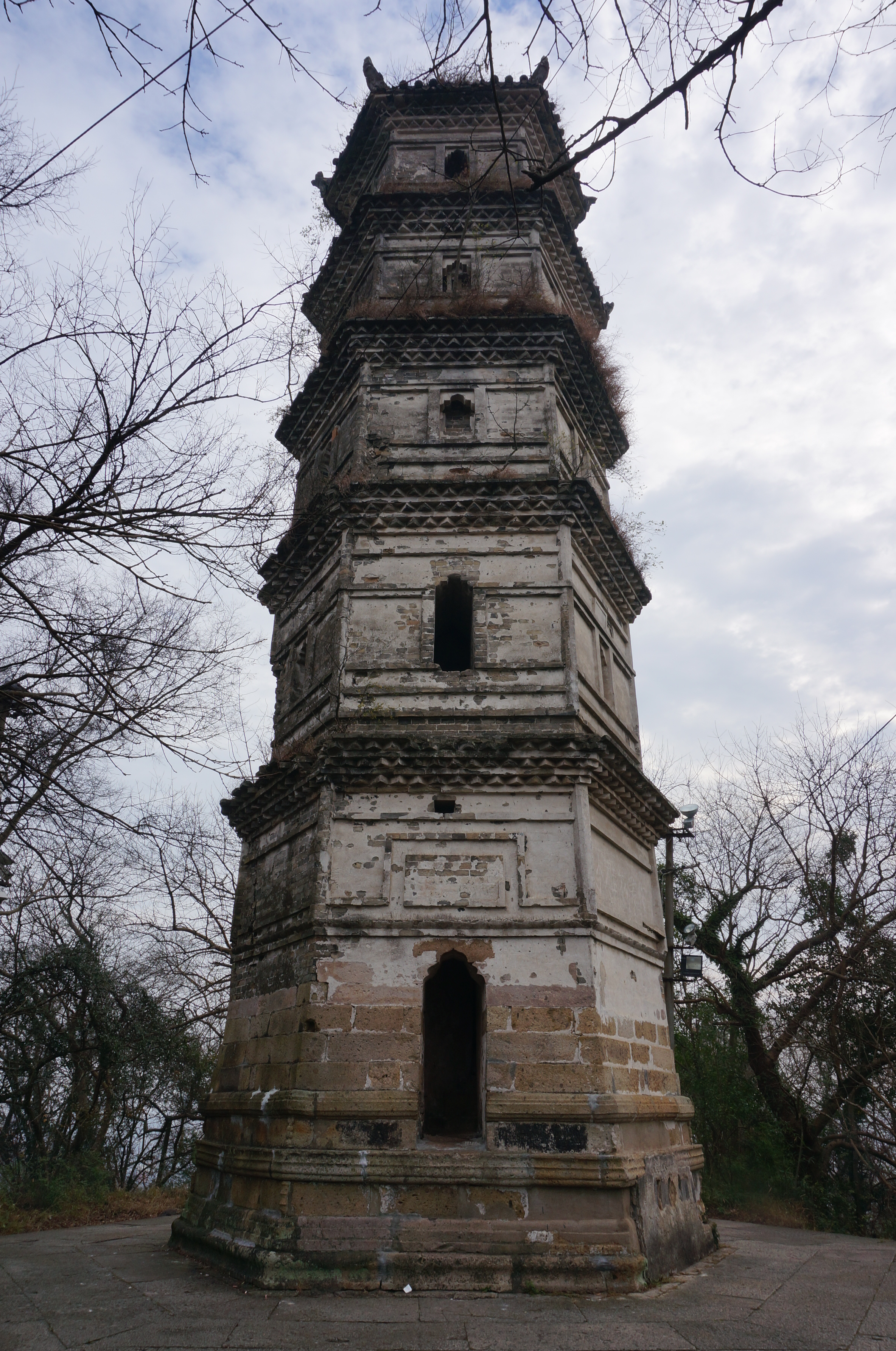 巾山大文峰塔（东大塔），西面。